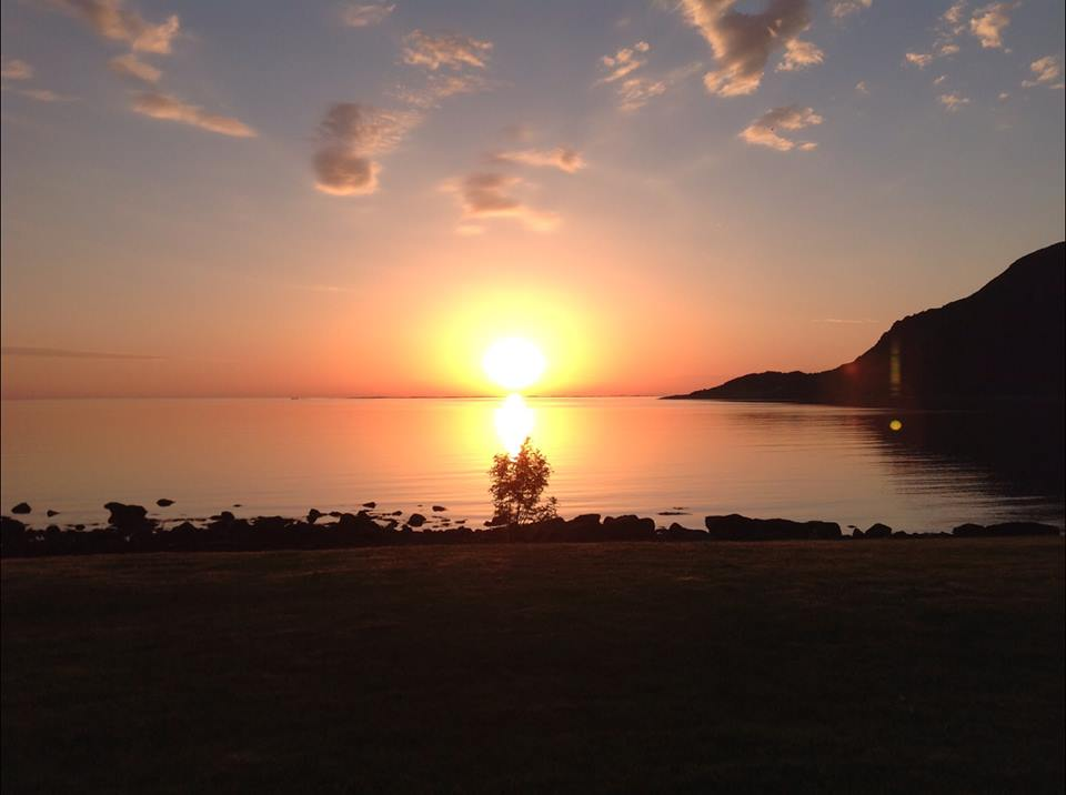 Midnattsol